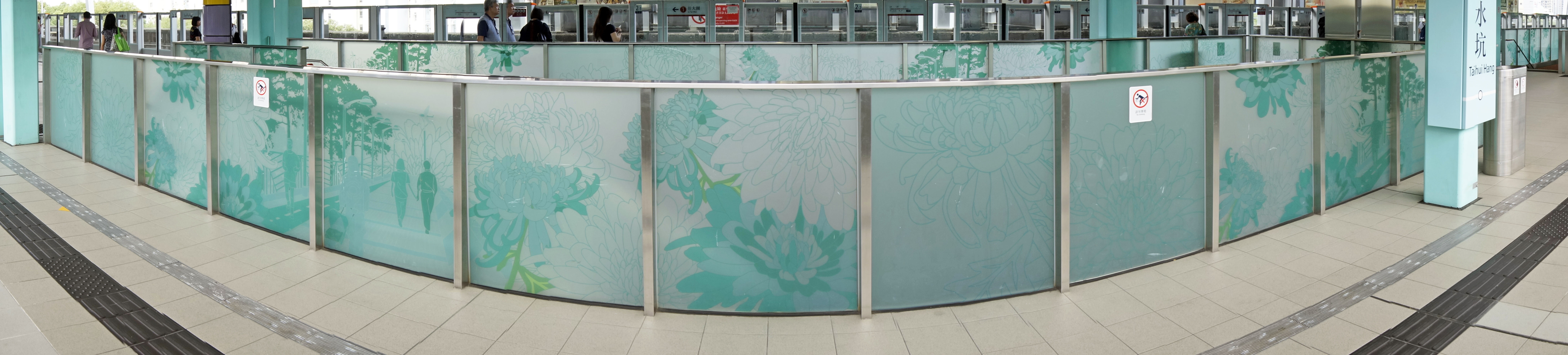 港鐵大水坑站月台佈置全景圖